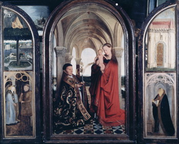 Maelbeke Madonna